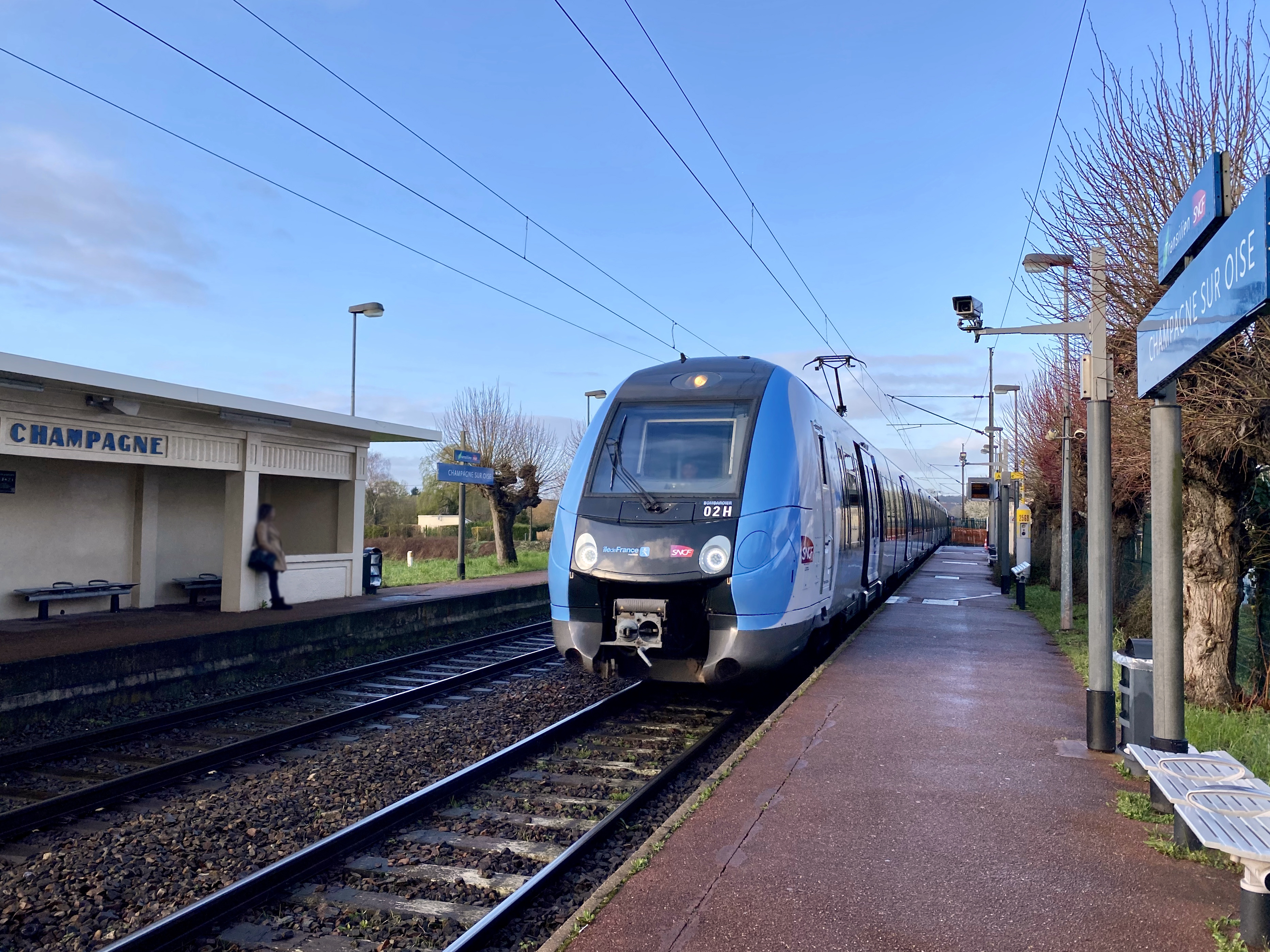 Le train POVA06 numéro 124611 de Paris-Nord à Persan - Beaumont est assuré en tête par la Z 50003/4 (02H) repelliculée seulement quelques jours avant en livrée Île-de-France Mobilités, et en queue par une autre Z 50000 en livrée Carmillon. Ce train est en train d'arriver en gare de Champagne-sur-Oise à la voie 1.